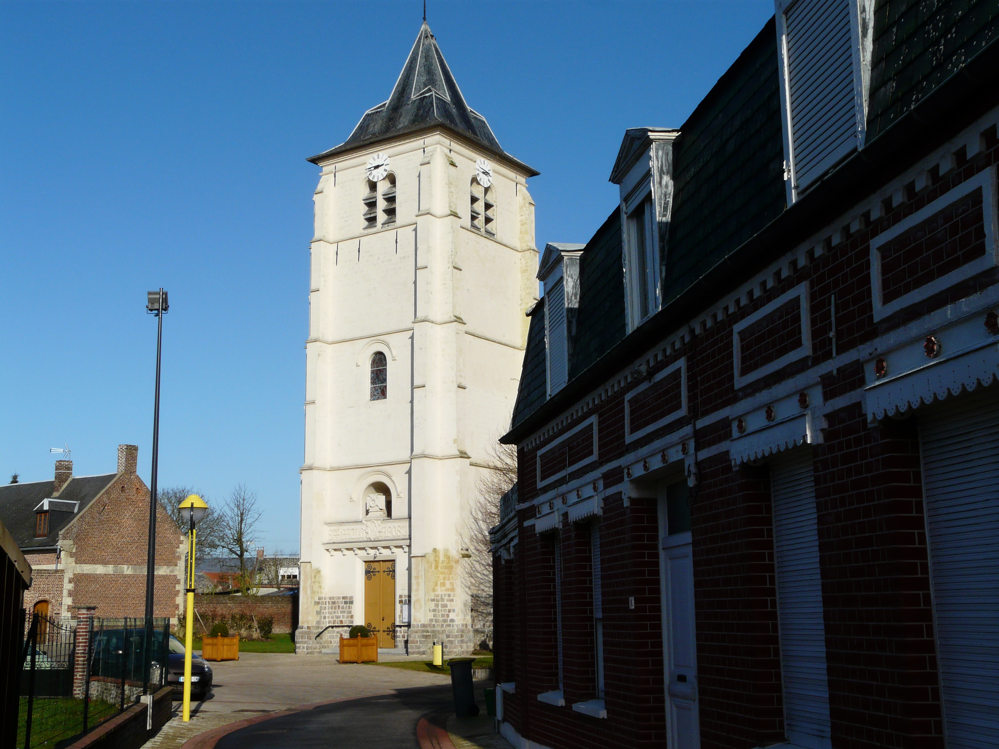 L'église de Naves